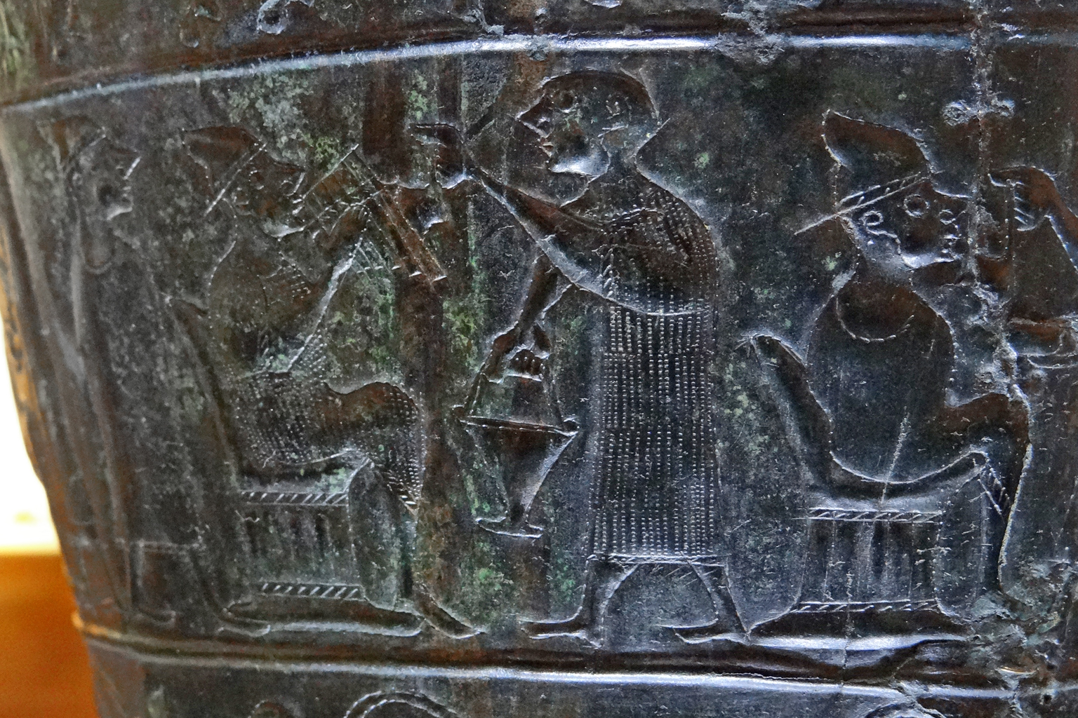 Décor figuré d'une situle (détail) de l'âge du fer bronze trouvé à Vače (Slovénie) environ 500 avant J.-C. Cette situle (situla en latin) possède des décors figurés montrant des scènes rituelles, de la vie quotidienne ou des animaux. Son style est caractéristique de la région slovène car les archéologues ont estimé qu'il ne s'agissait pas de motifs copiés sur des productions originaires de Grèce ou d’Étrurie. Les trésors du musée national de Slovénie (exposition permanente) Article de Wikipedia sur la situle de Vace